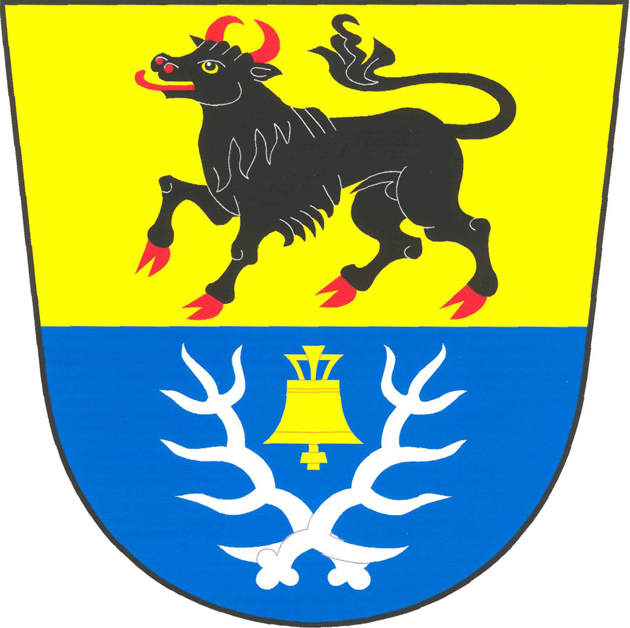 Znak obce Měňany